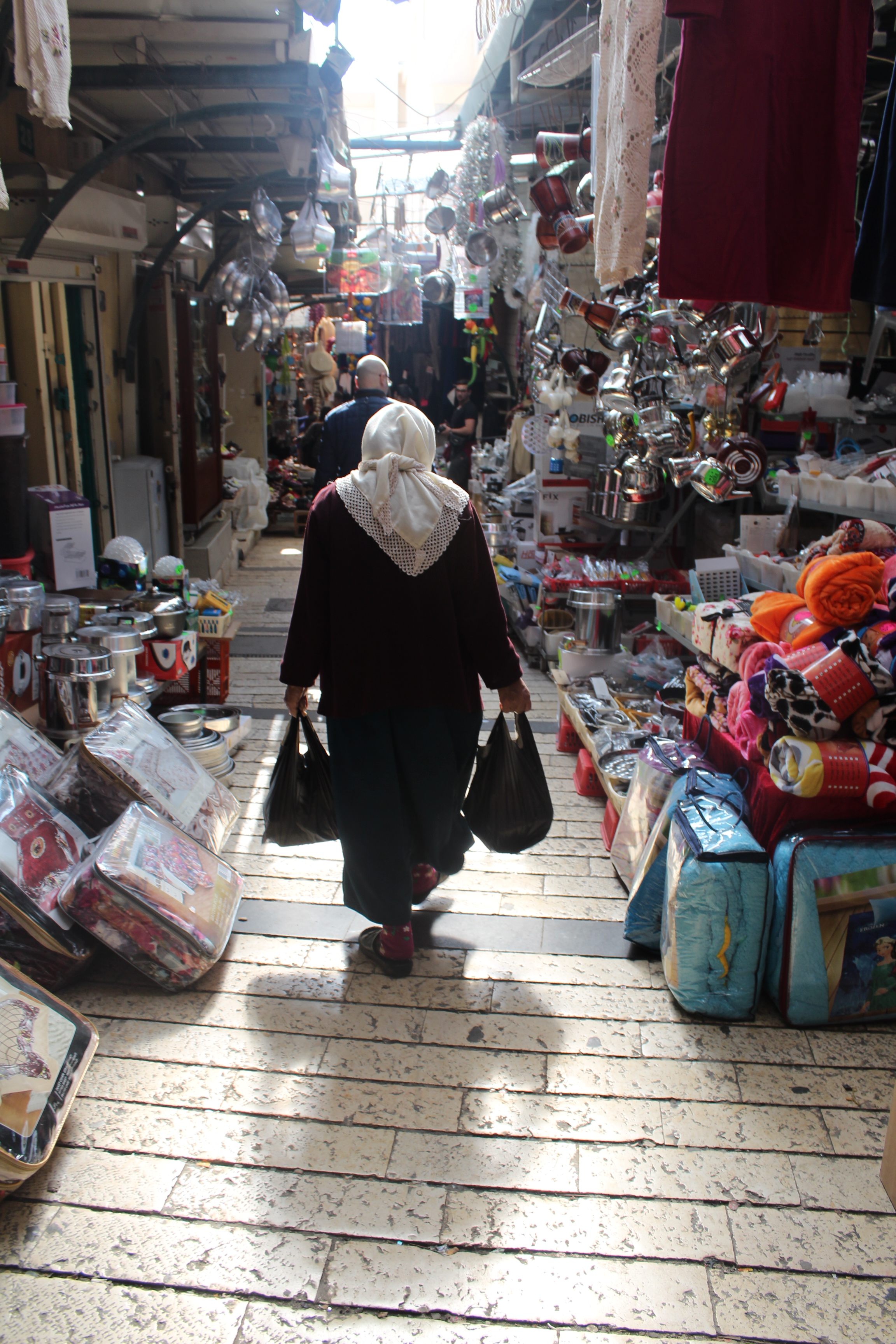 יום קניות בשוק בנצרת צולם בינואר 2016, השוק הוא מדרחוב במרכז העיר העתיקה מלא בדוכנים של כלי מטבח, בגדים, טבק טרי, צעצועי ילדים, חנויות ממתקים, ומבחר גדול של תבלינים וצמחי מרפא.